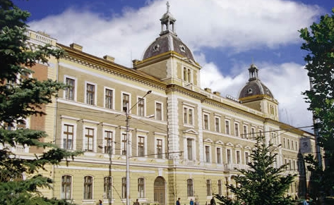 Palatul Arhiepiscopiei Ortodoxe din Cluj-Napoca - Kolozsvári ortodox püspöki palota